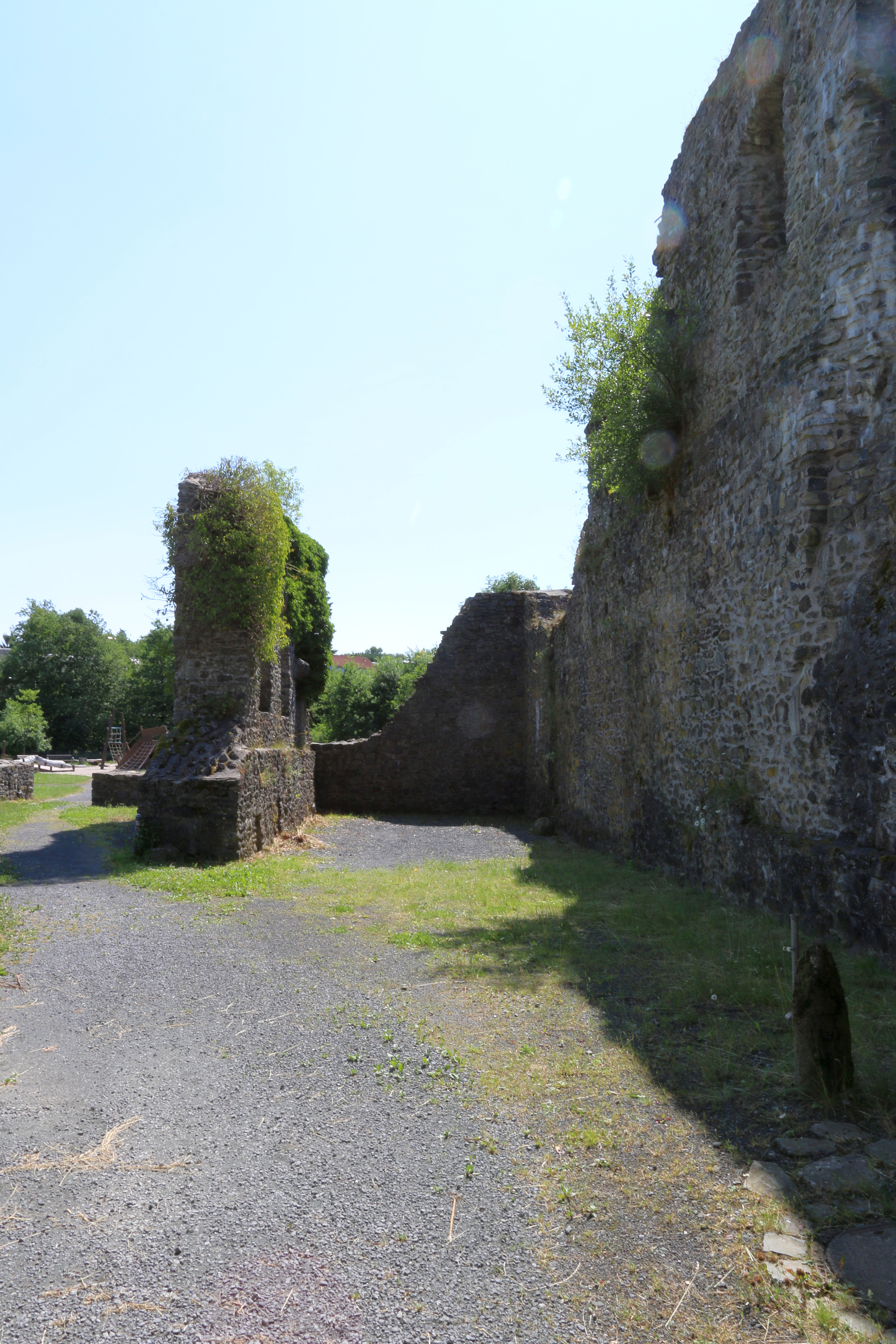 Driedorf: Unterburg Junkerwiese